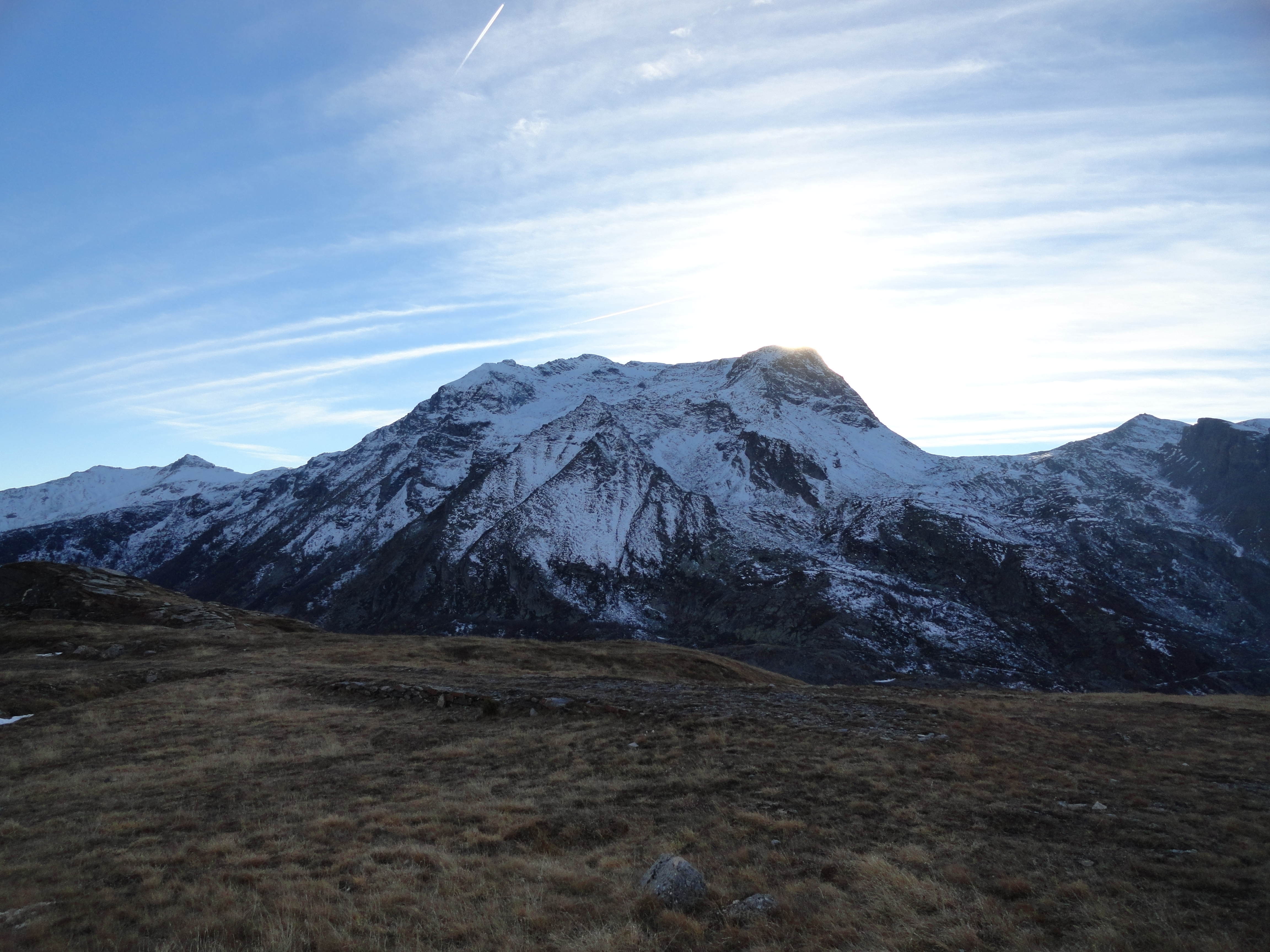 I Monti Giusalet (al centro) e Malamot (sulla destra)